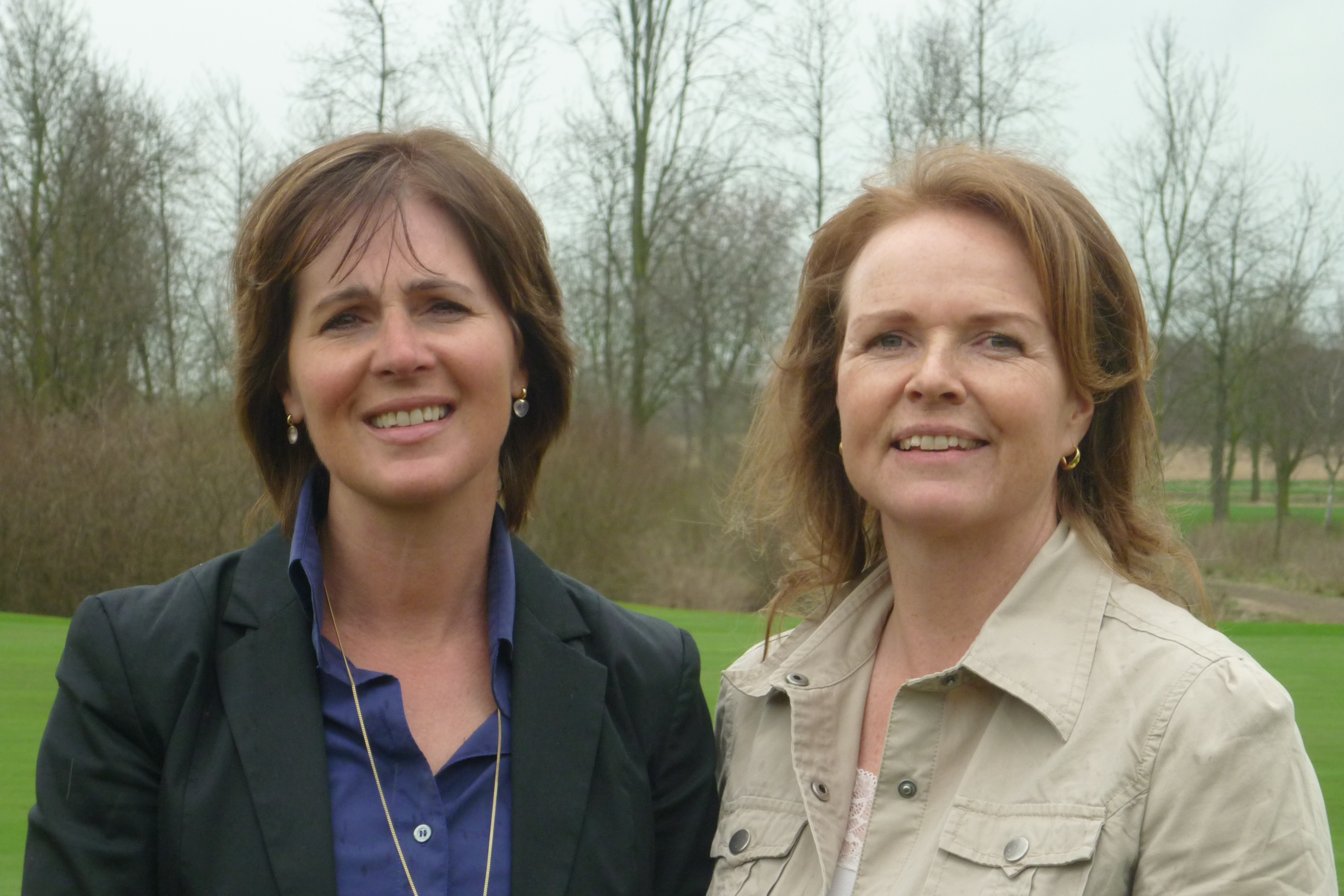 Liz Weima, toernooidirecteur Dutch Ladies Open